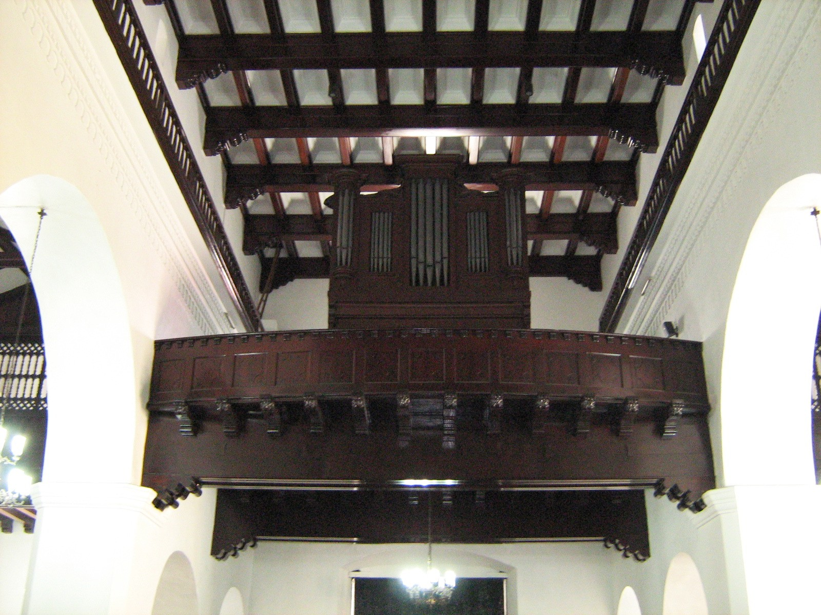 Órgano E.F. Walcker de la Basílica Menor de Nuestra Señora de la Candelaria, fue Catedral hasta 1931, Medellín, Colombia